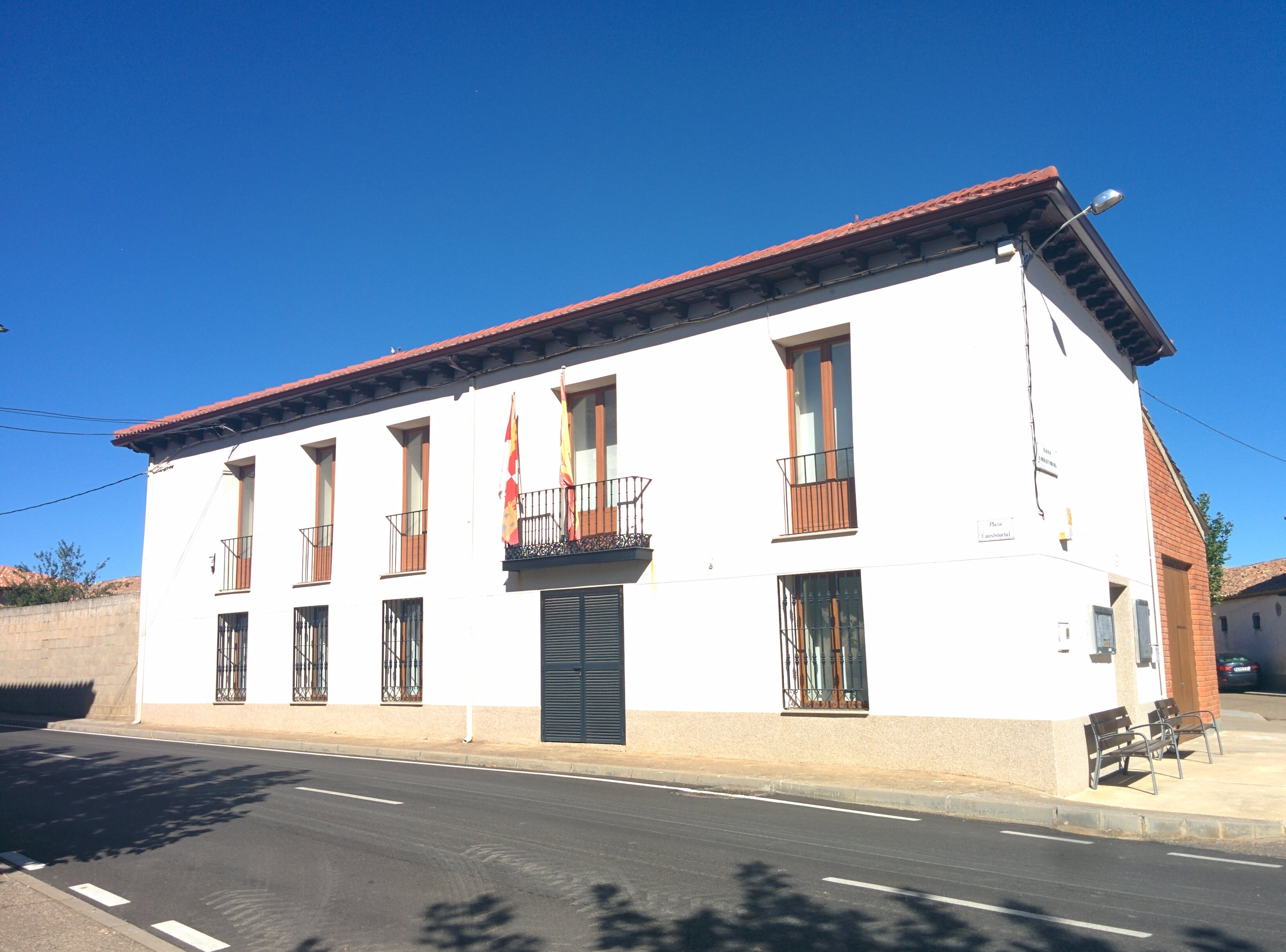 Casa consistorial de Villanueva de los Caballeros (Valladolid, España).